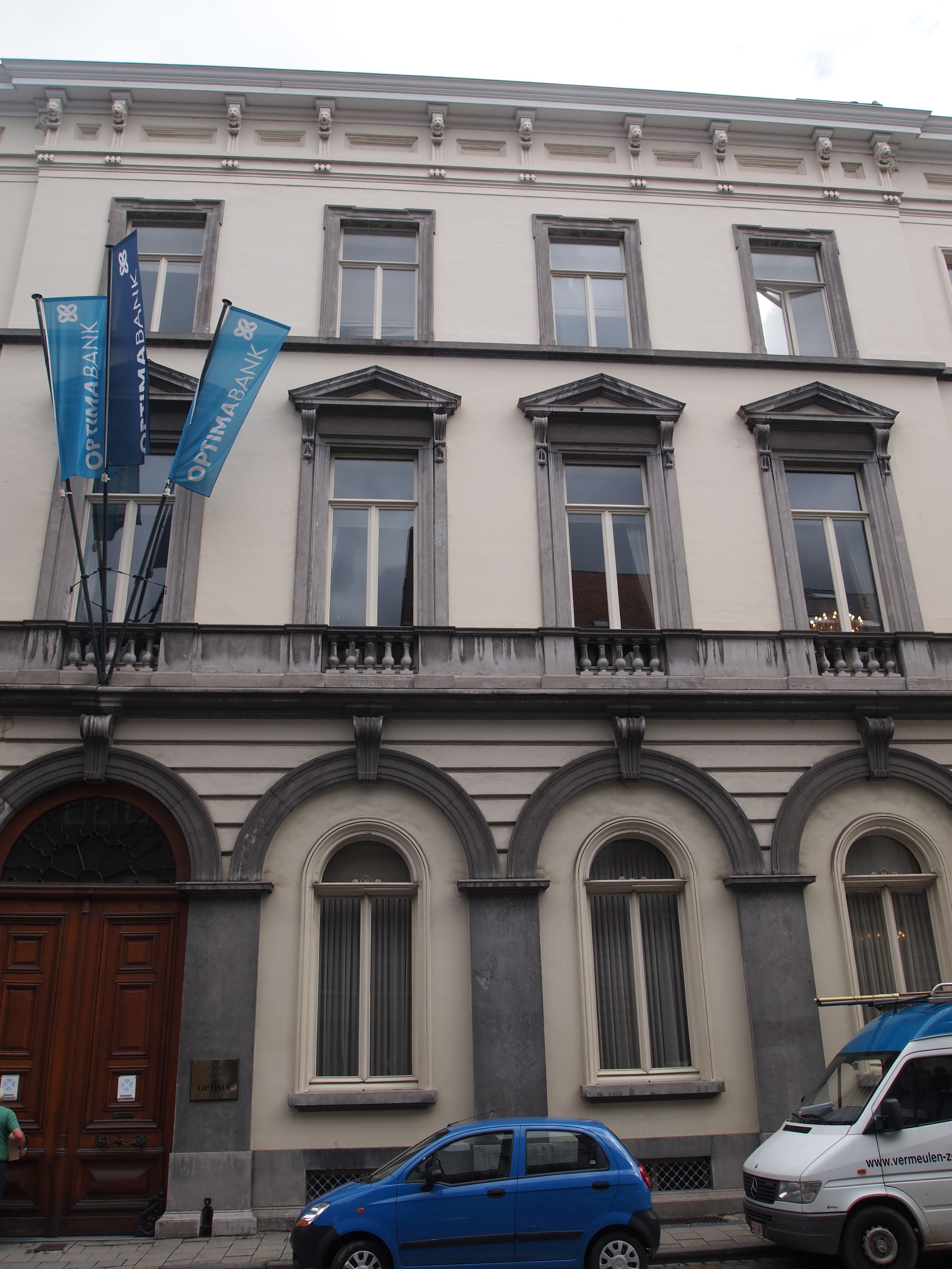 Gebouwd ca. 1842-1848 in opdracht van Ferdinand Lousbergs. Kwam in 1858 in bezit van industrieel Joseph de Hemptinne. Sinds 1993 hoofdzetel van de Gentse Optima Bank.